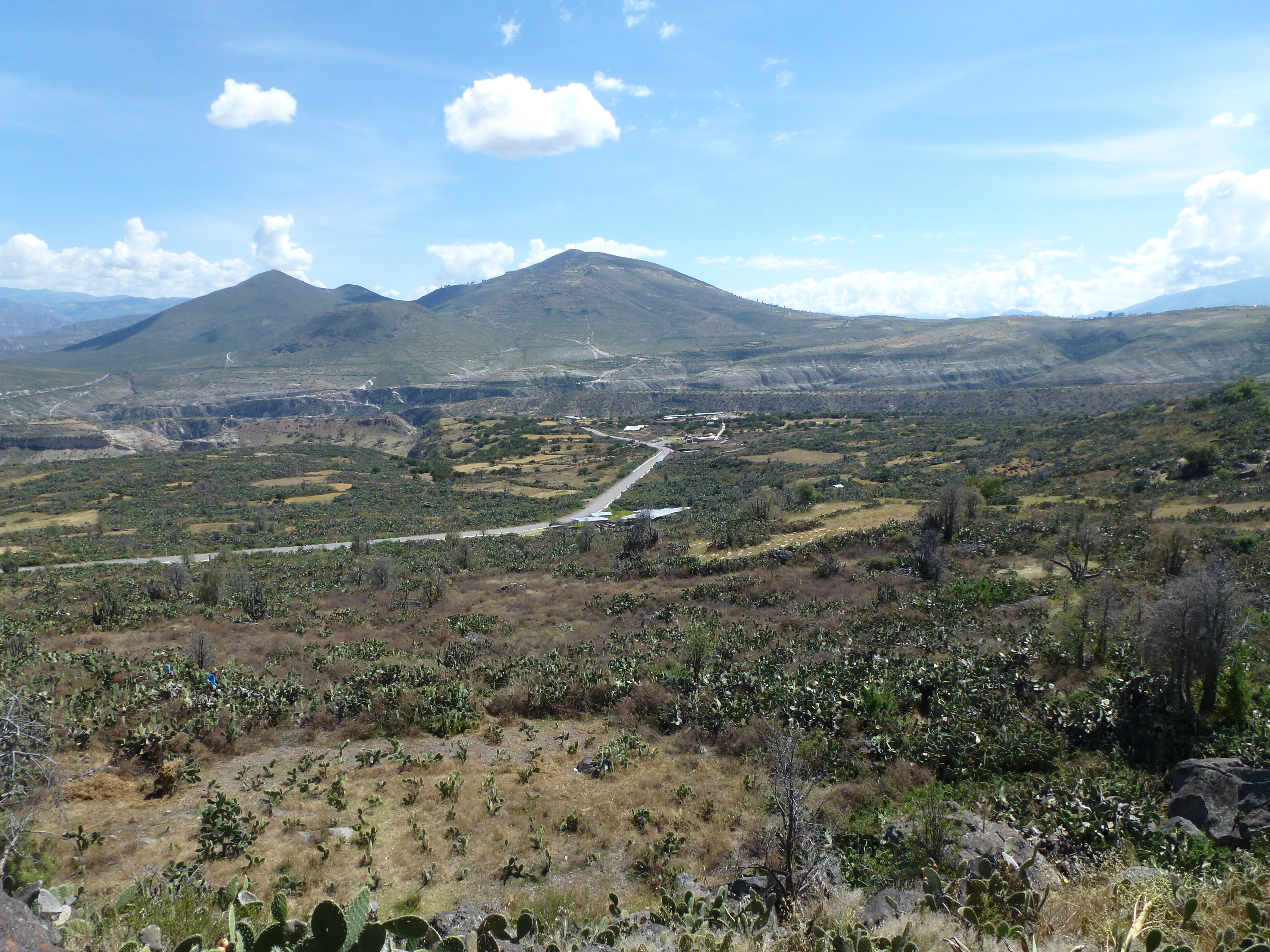 Vista de las ruinas Wari